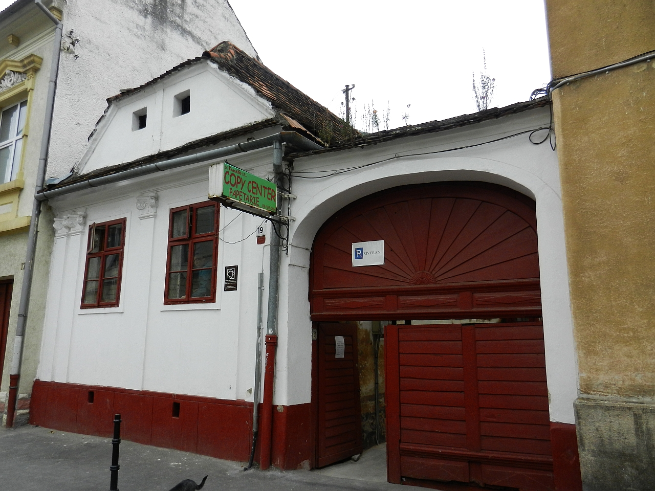 Casa monument istoric (Prundului 19)